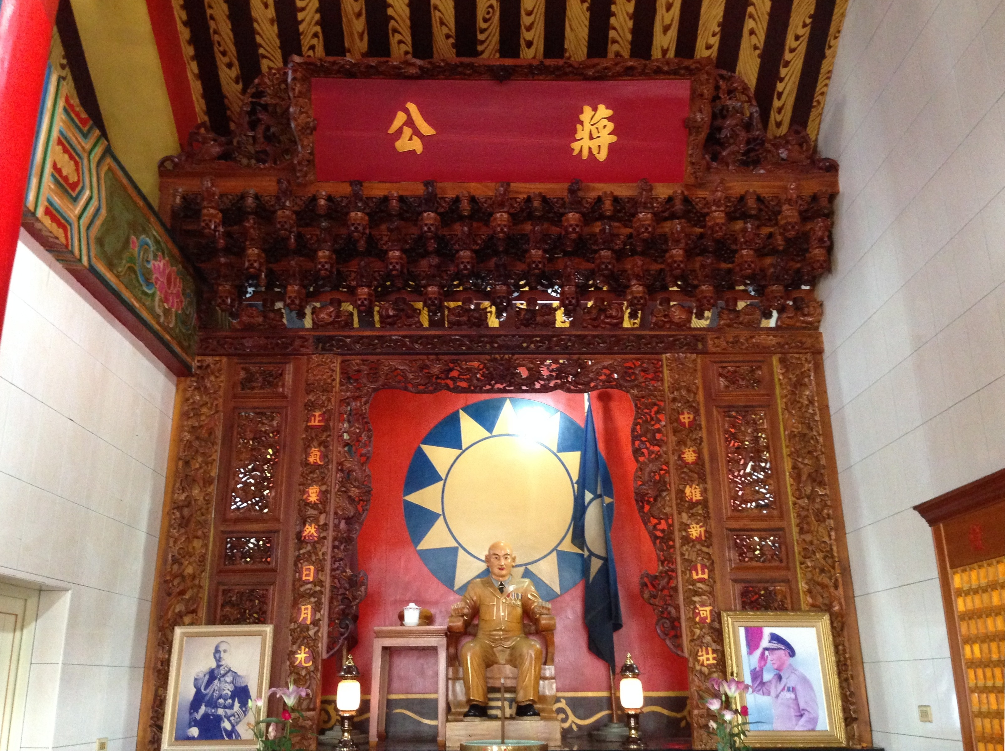 蔣公感恩堂蔣公神像